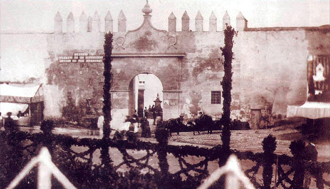 Puerta de Gallegos, una de las antiguas puertas de las murallas de Córdoba.